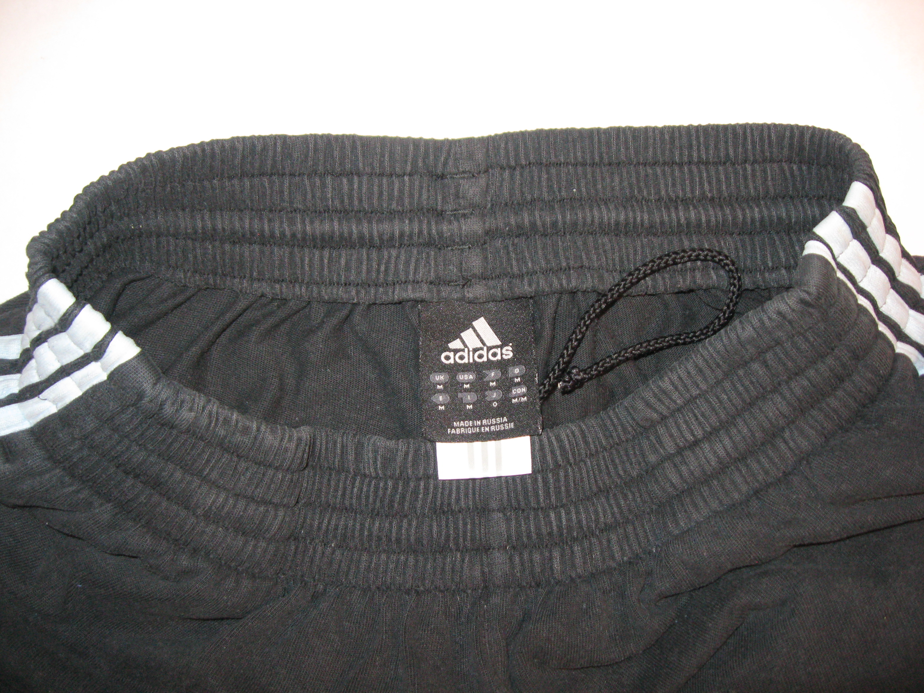 Бирка на спортивных брюках от Adidas, сшитых в России.